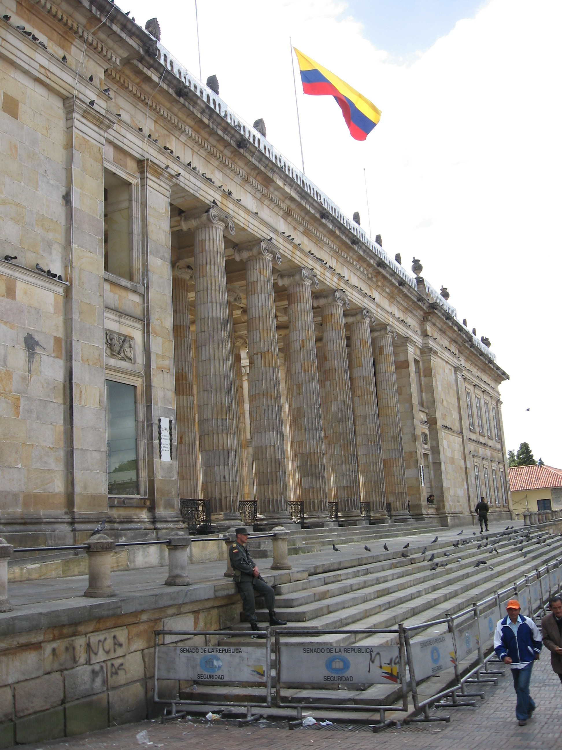 Capitolio Nacional, Bogotá Colombia